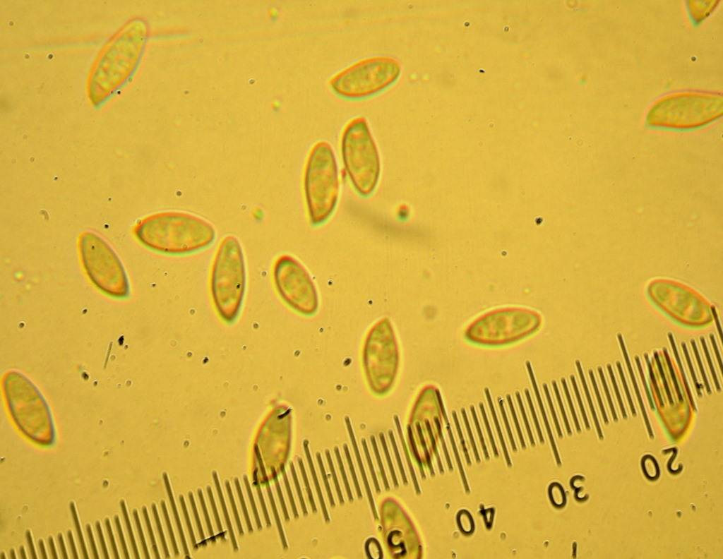 Chalciporus piperatus (Bull.) Bataille